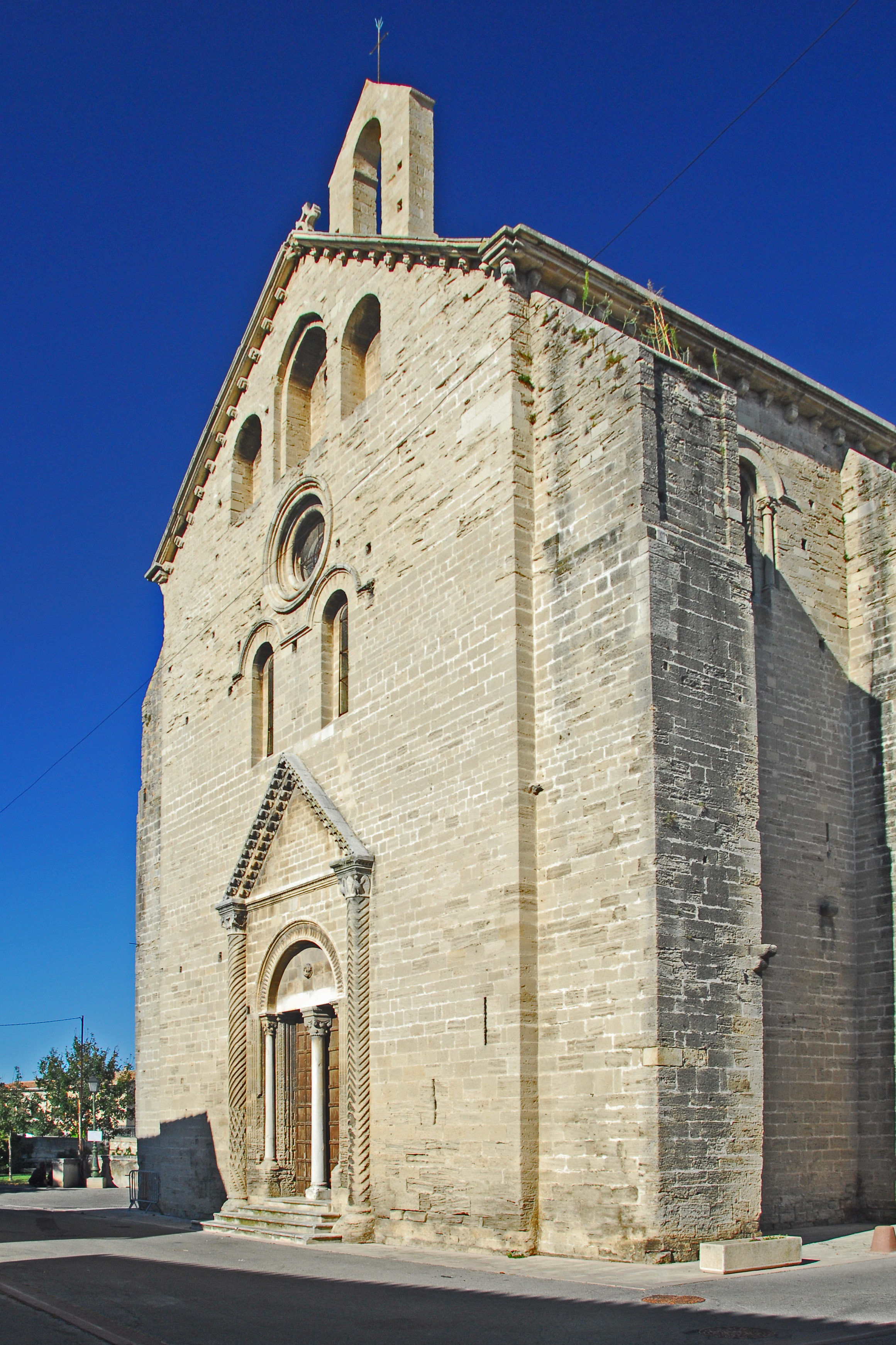 N-D-du-Lac du Le Thor, Fassade von Südwest